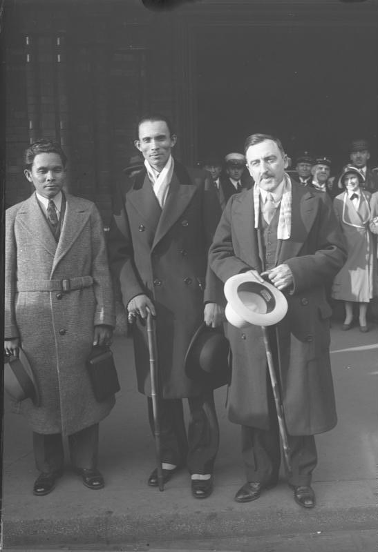 Der Freiheitskampf der Philippinen Dr. Hilario Camino Moncado (Mitte) mit seinen beiden Sekretären, der Führer und Vorkämpfer für den Freiheitskampf der Philippinen, ist in Berlin eingetroffen. Dr. Moncado unternimmt eine 5 monatige Weltreise im Interesse des Kampfes der Philippinen für ihre Unabhängigkeit und ihre Forderung an den amerikanischen Congress mit dem Ziel der Errichtung einer freien Republik.